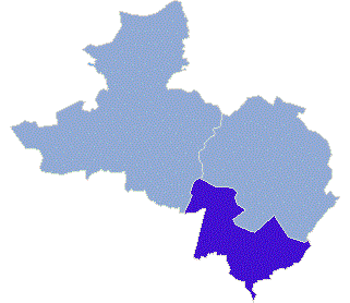 Powiat wschowski - Gmina Szlichtyngowa